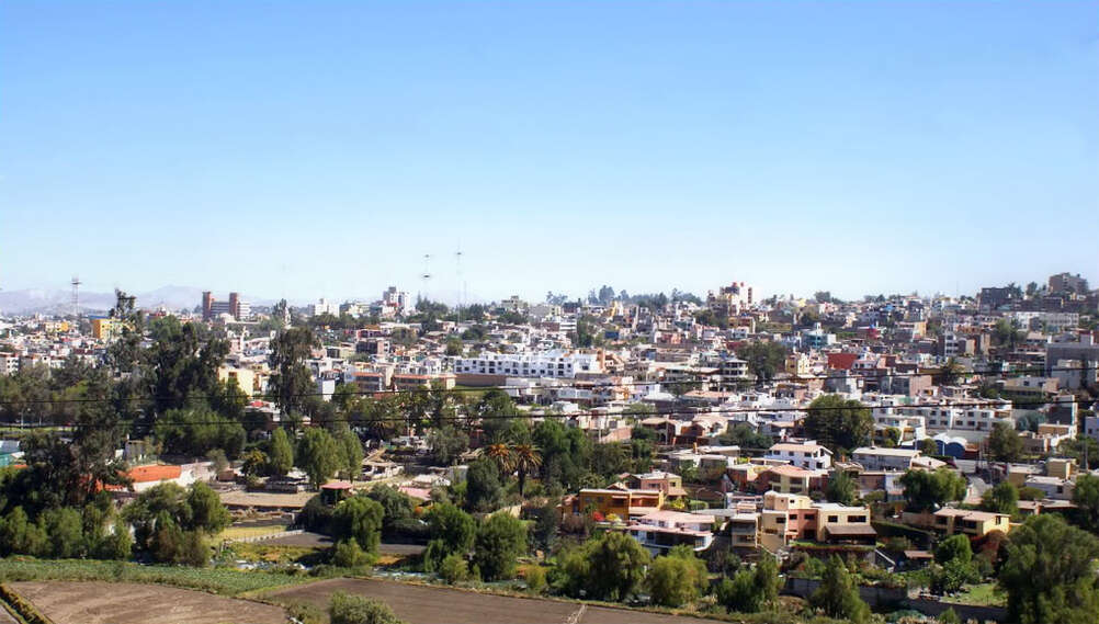 Vista panorámica de los distritos de Arequipa, Yanahuara y Cayma